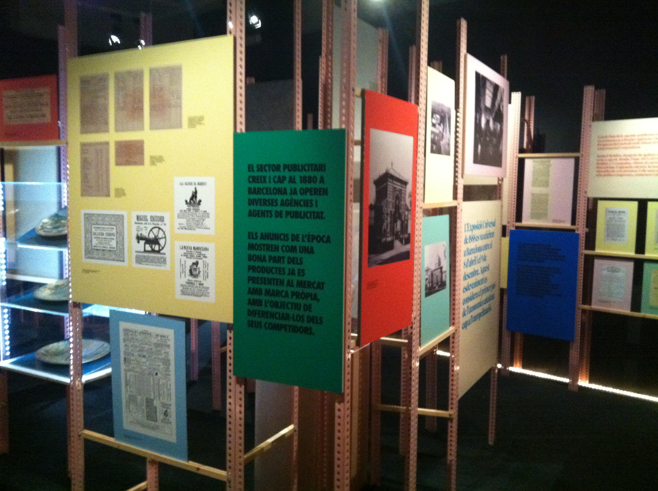 Palau Robert- Expo publicitat 2011 (1)